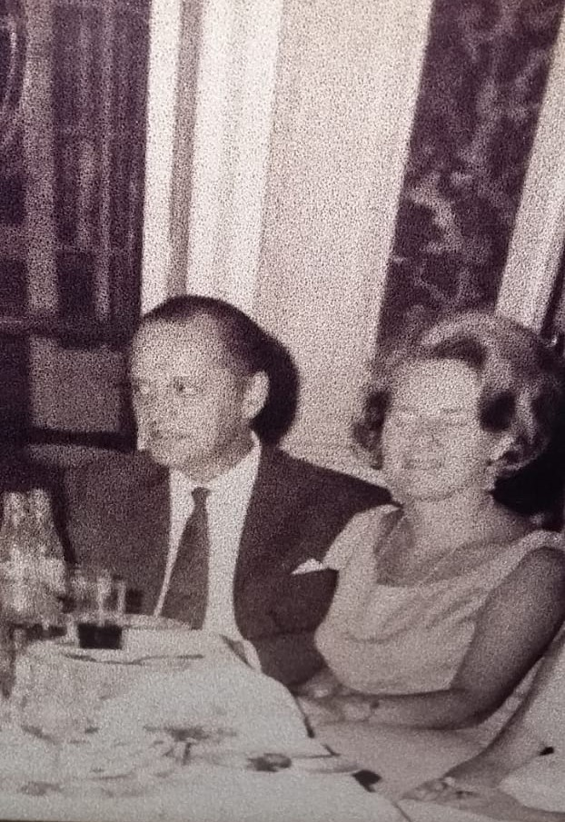 Marío Bertozzi fue gobernador de la provincia de Entre Ríos